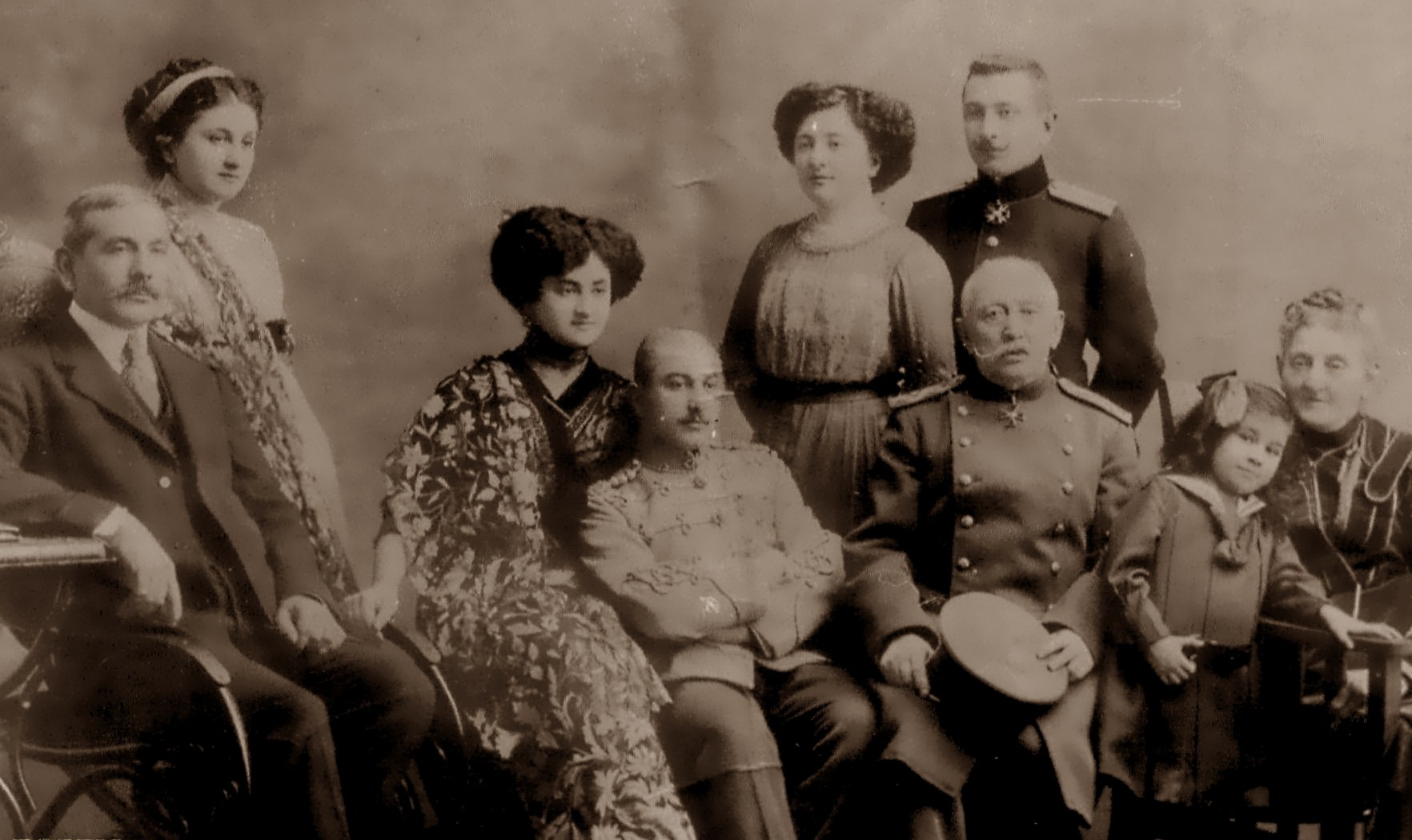 Муртуза Мухтаров (слева) во Владикавказе с семьей Лизы.